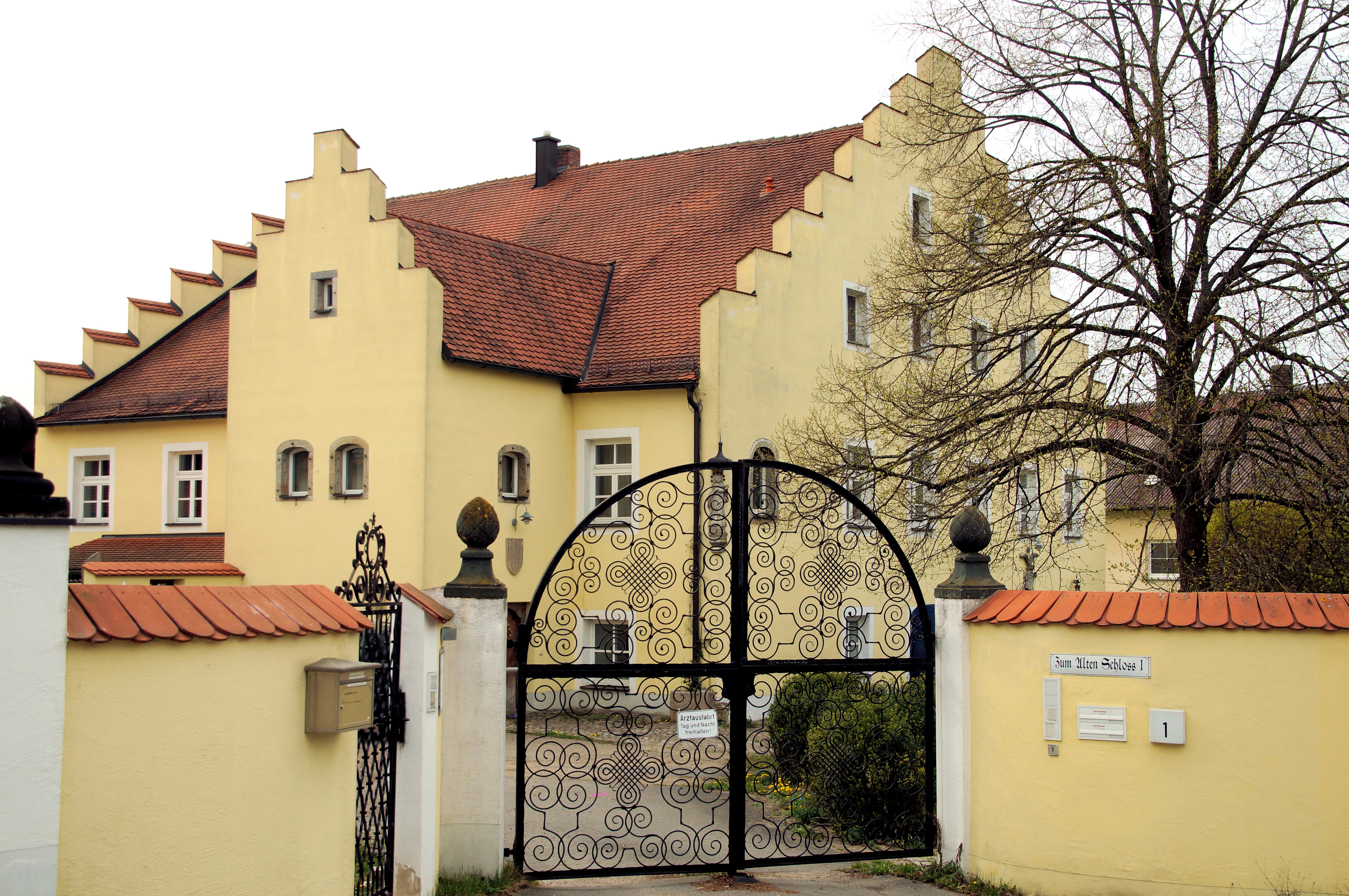 Ehem. Schloss, zweigeschossiger und giebelständiger Satteldachbau mit Treppengiebel und Treppenhausanbau, 18. Jahrhundert